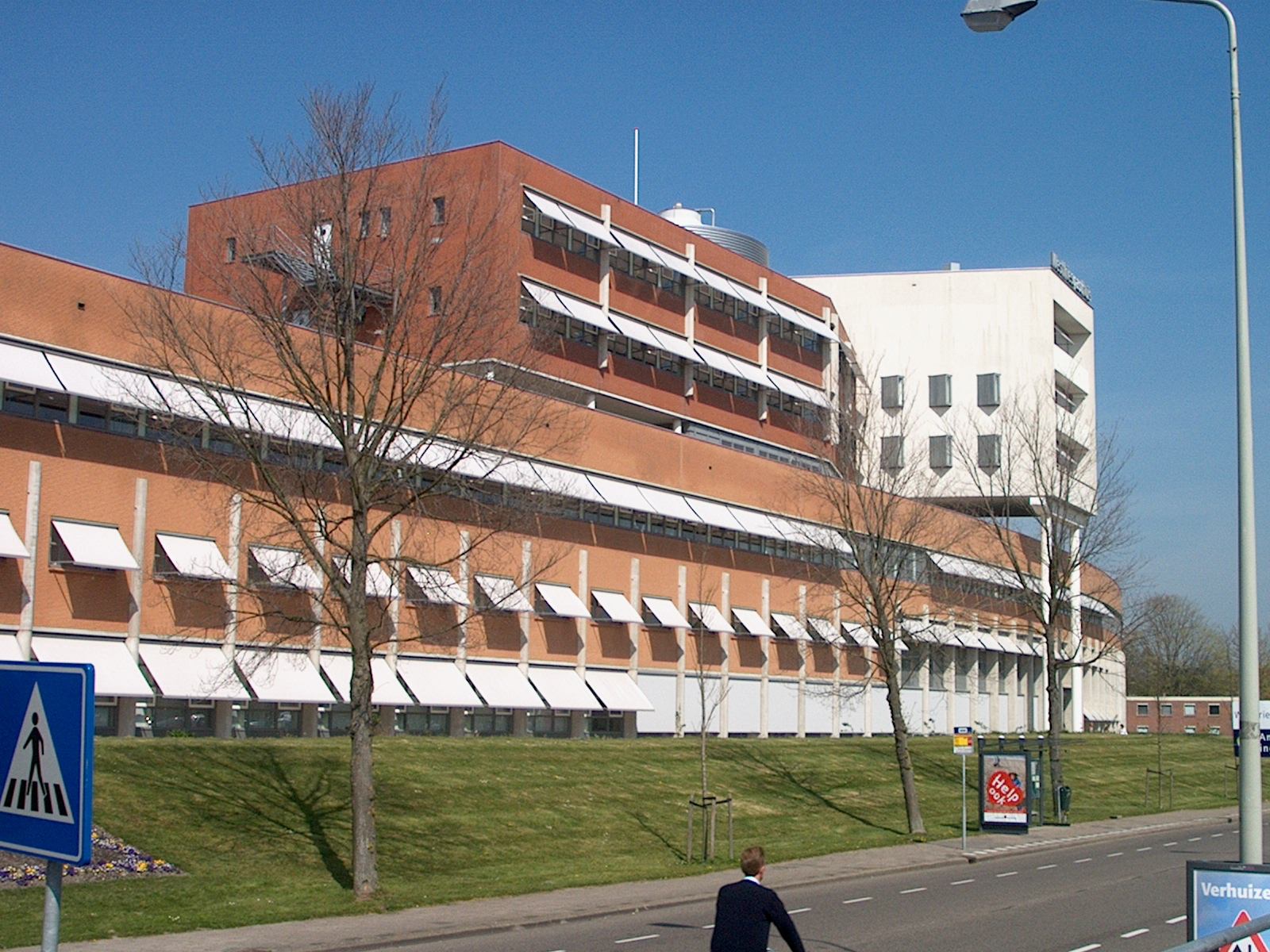 Dijklander Ziekenhuis, Hoorn (Noord-Holland), Nederland